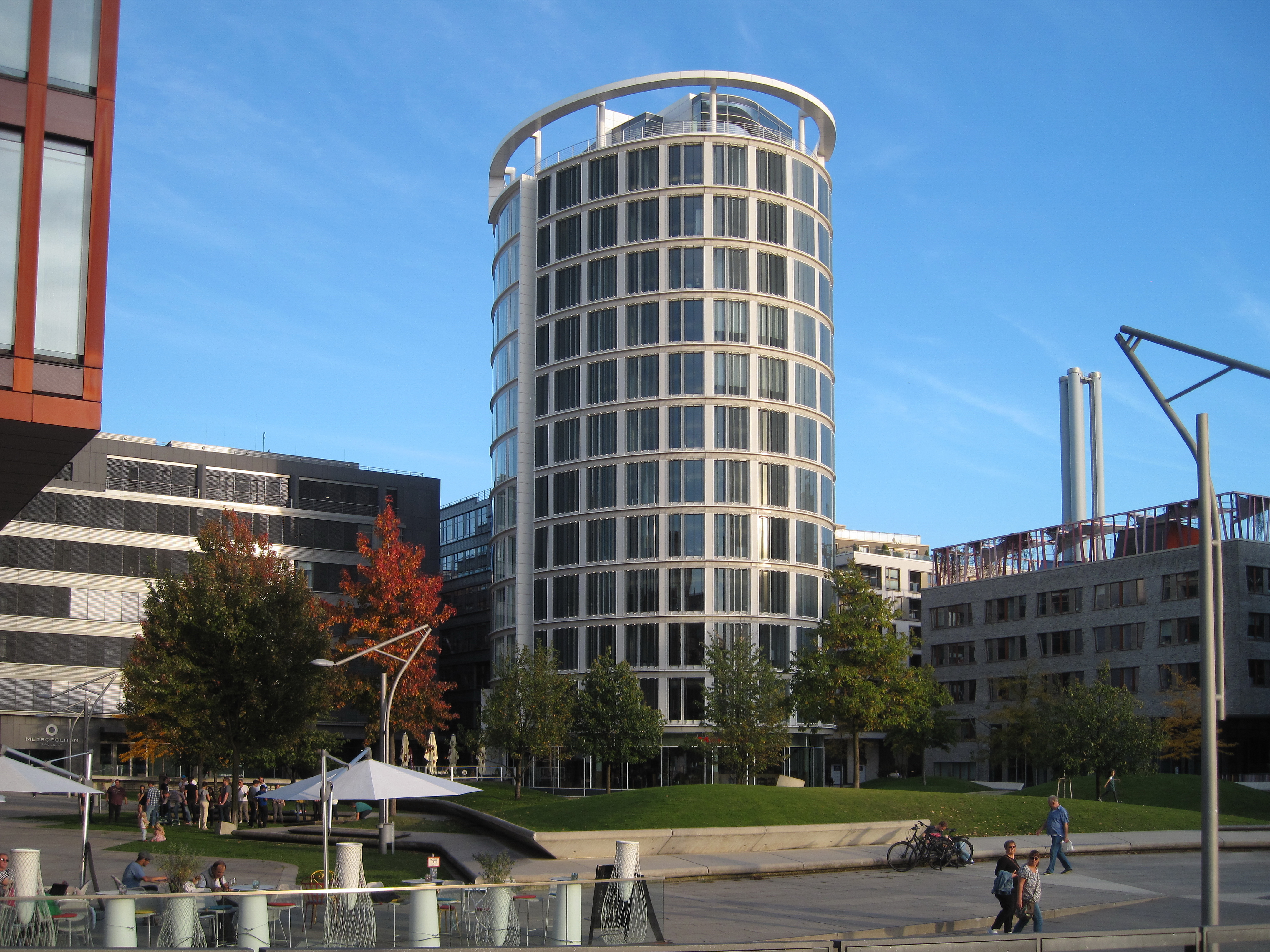 Sandtorpark in Hamburg, Bezirk Mitte, Stadtteil Hafencity. NKG-Verwaltungsgebäude in der Bildmitte.